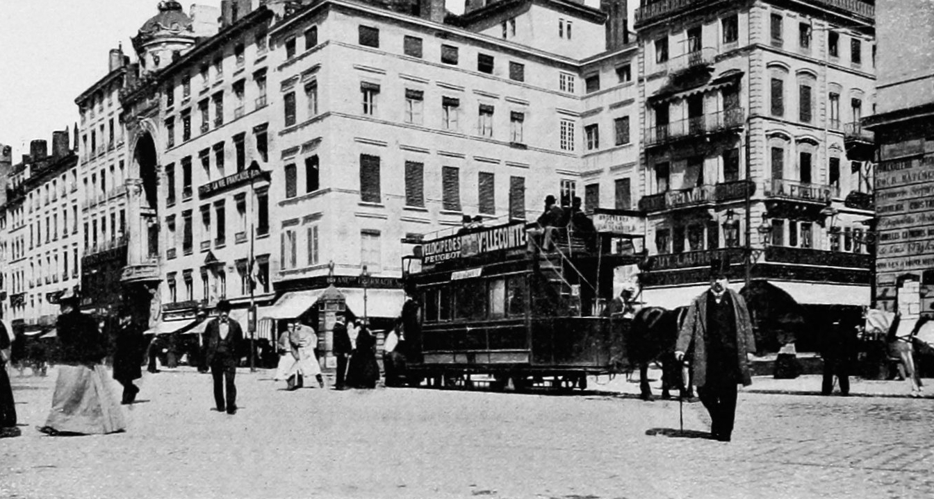 Dictionnaire illustré des communes du département du Rhône. Tome 2 / par MM. E. de Rolland et D. Clouzet.